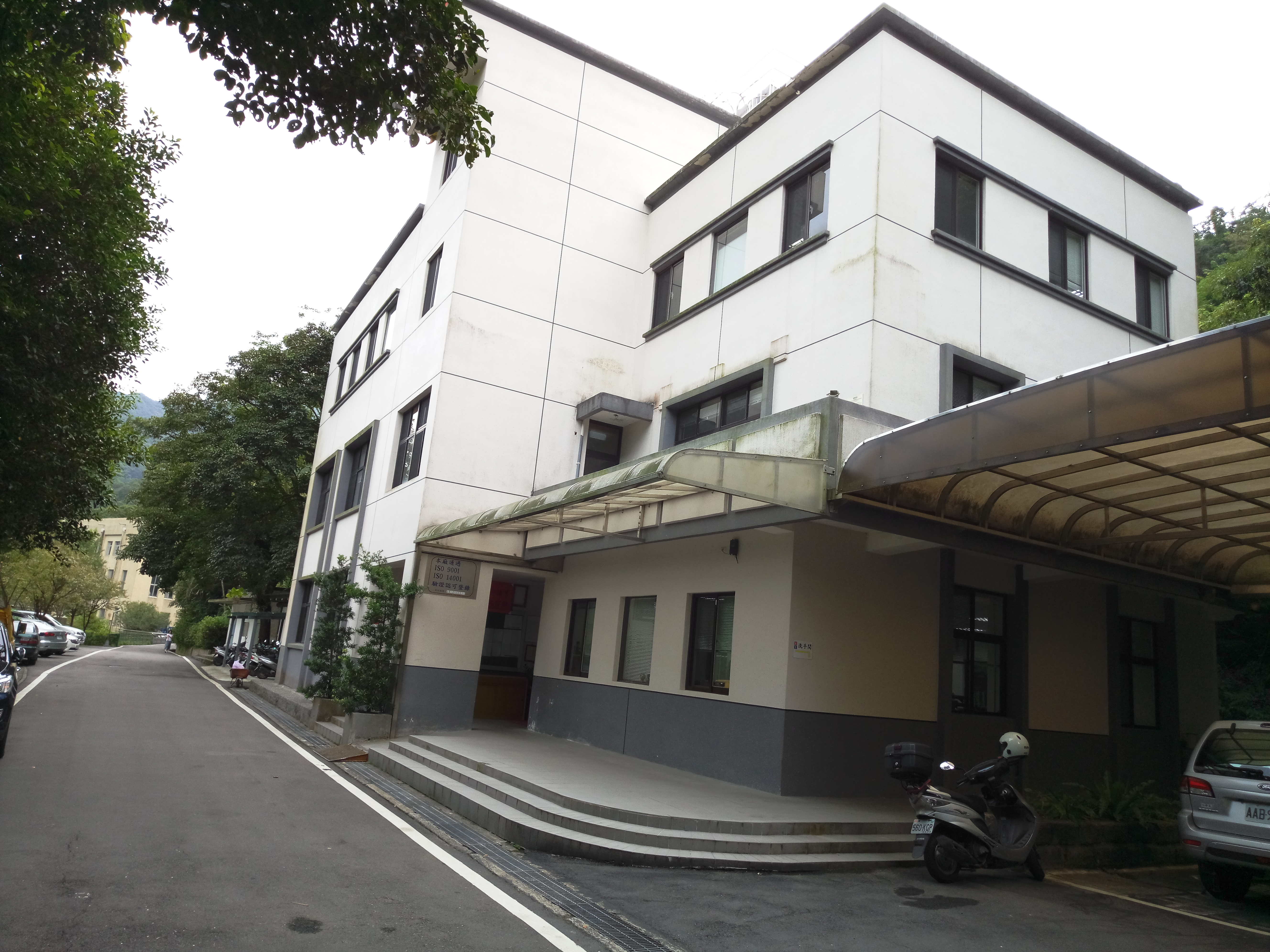 桂山發電廠辦公廳，控制室則沿用新龜山發電廠的控制室做其他分廠的遠端遙控。